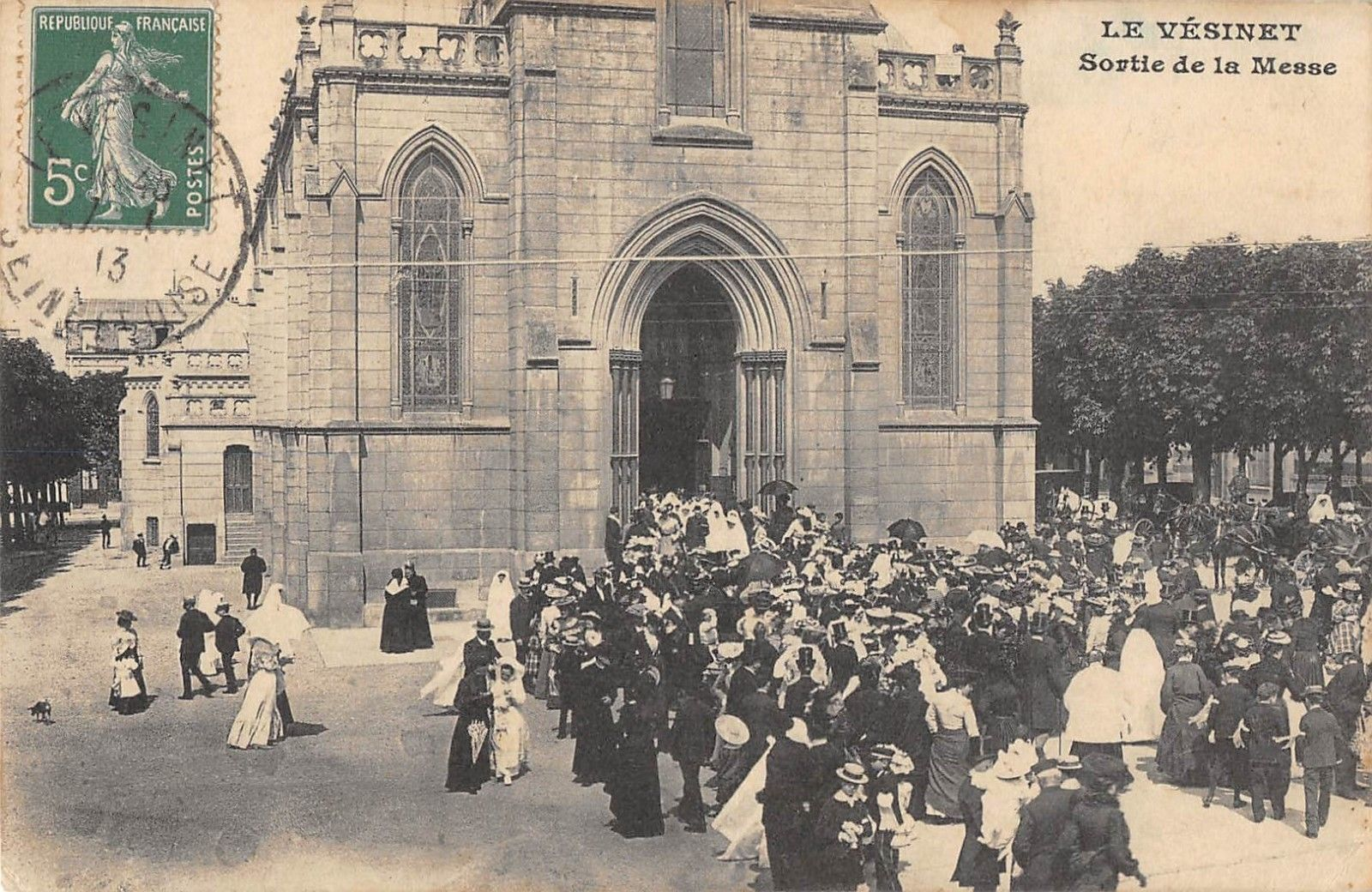 Sortie de messe de communion solennelle en 1913 à l'église Sainte-Marguerite du Vésinet.